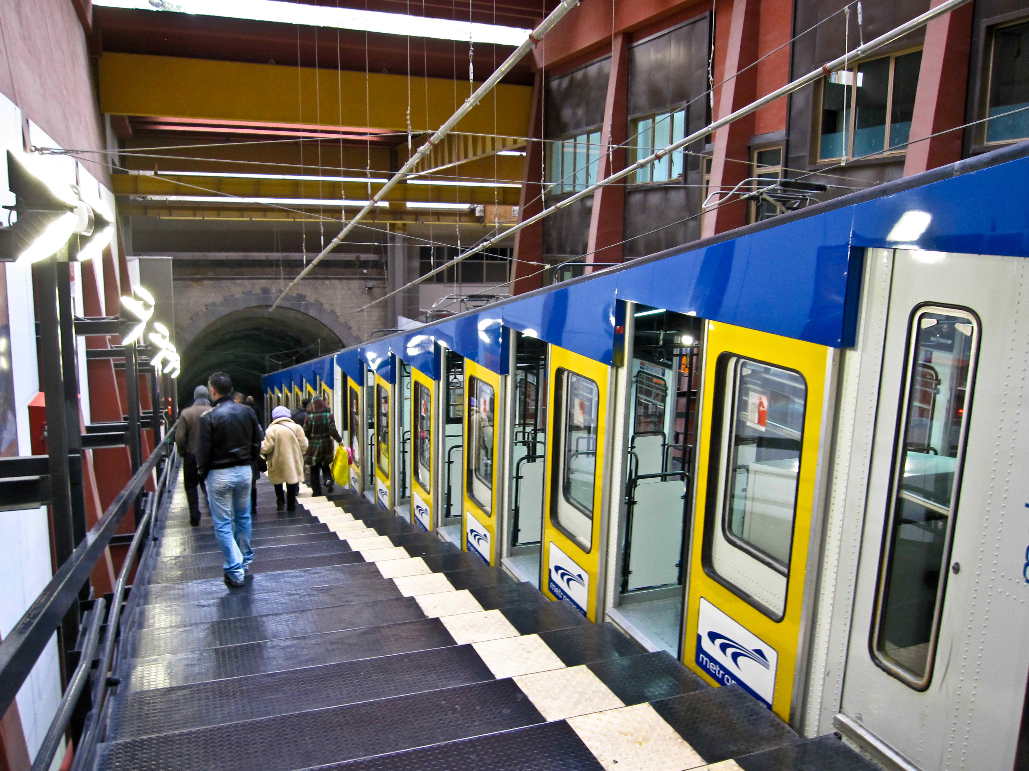 Stazione Vomero Via Morghen